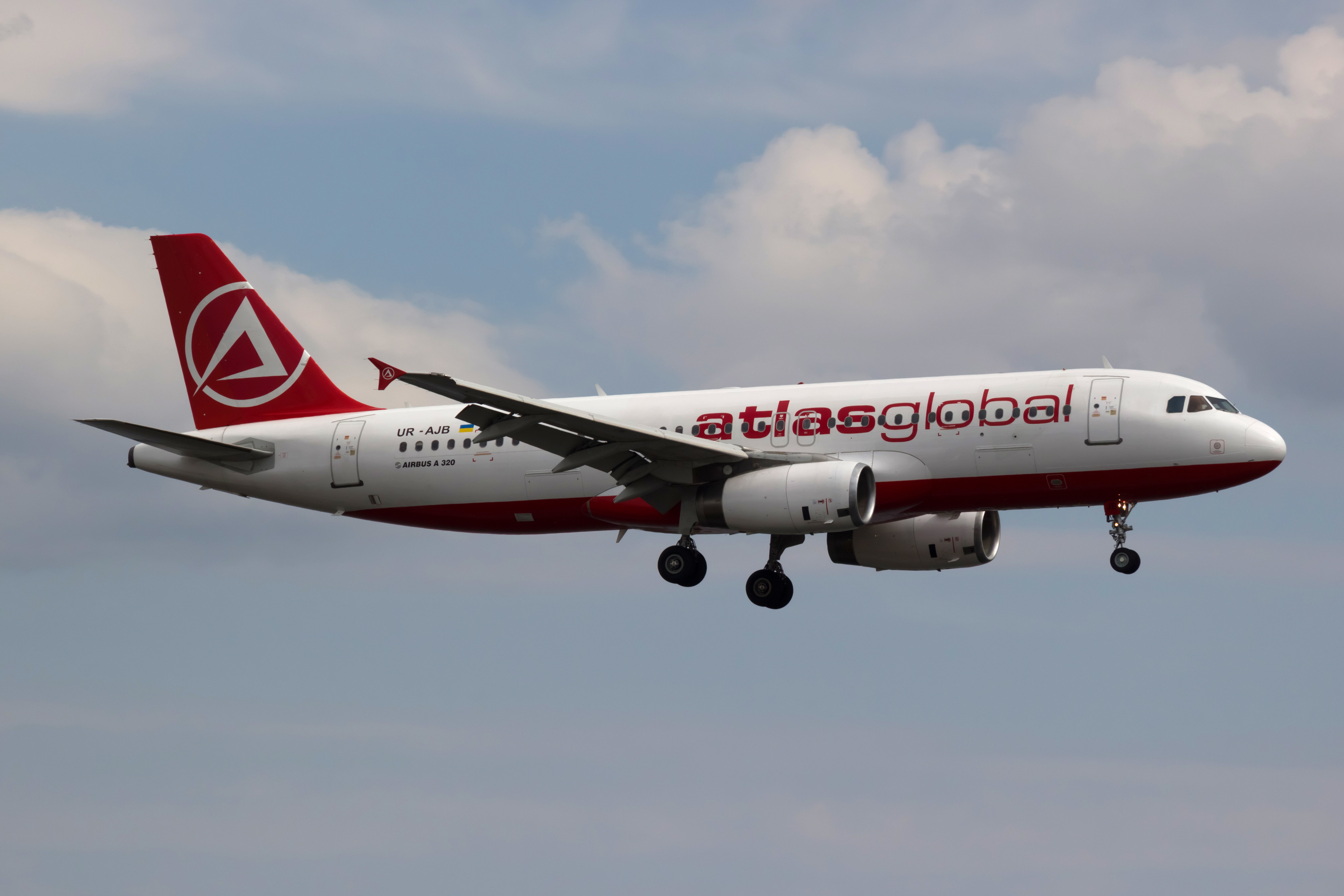 Airbus A320 de AtlasGlobal aterrando no aeroporto de Arlanda.